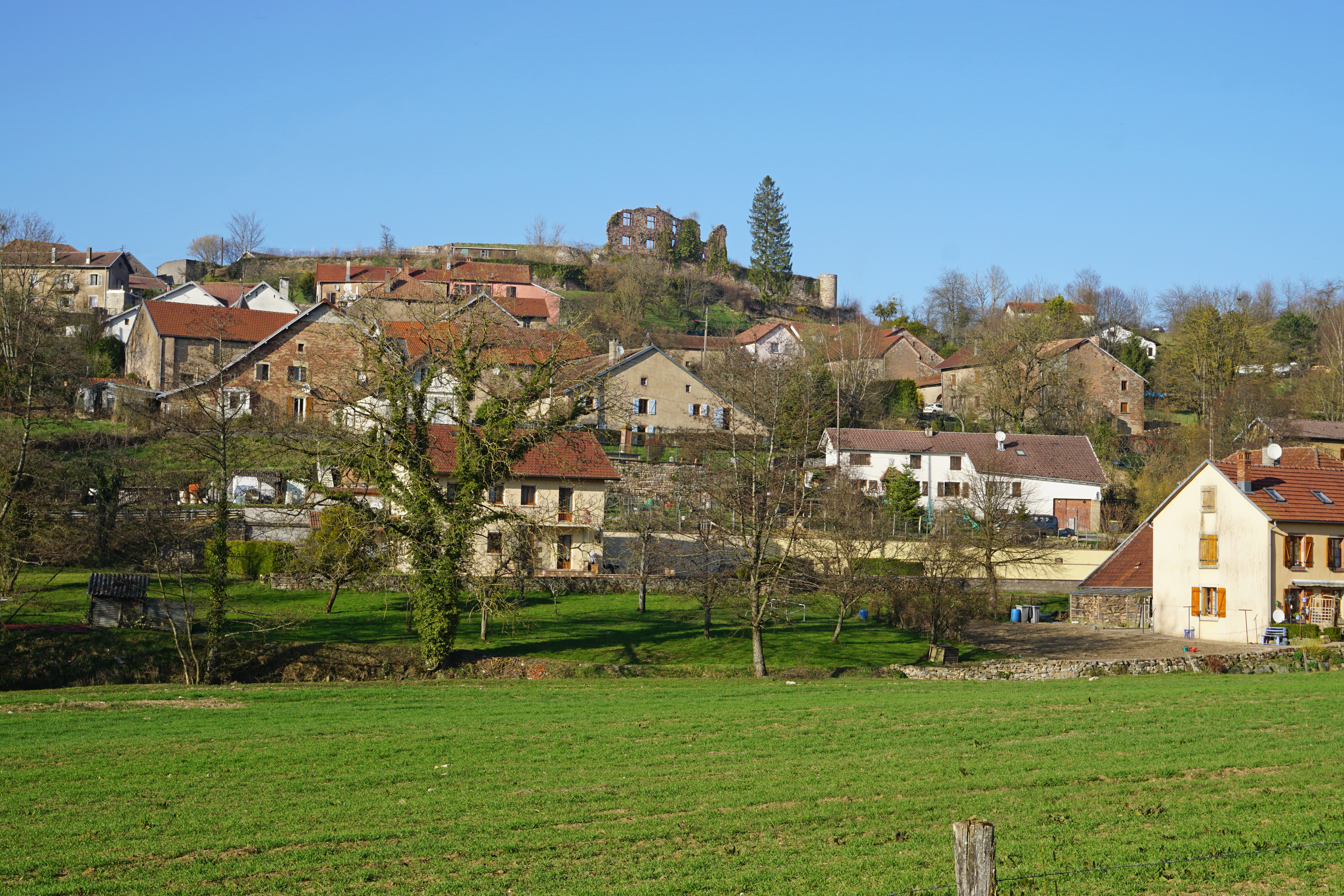 Vue générale de Granges-le-Bourg.